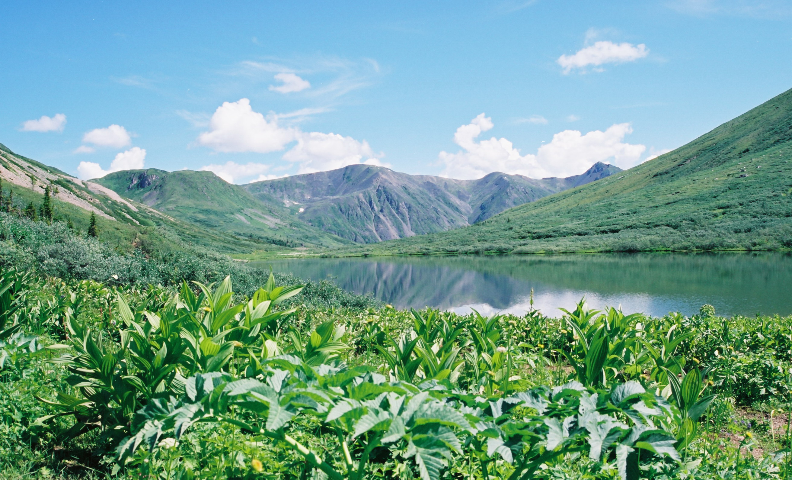 В окрестностях дикого курорта Жойган, на перевале. Окинский район Бурятии, Забайкалье.